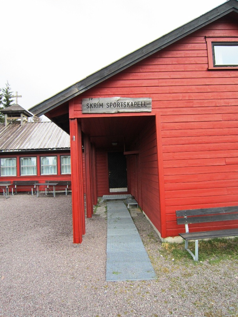 Skrim sportskapell, Omholtfjellet (Kongsberg kommune)